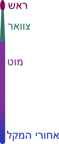 מבנה של he:מקל תיפוף